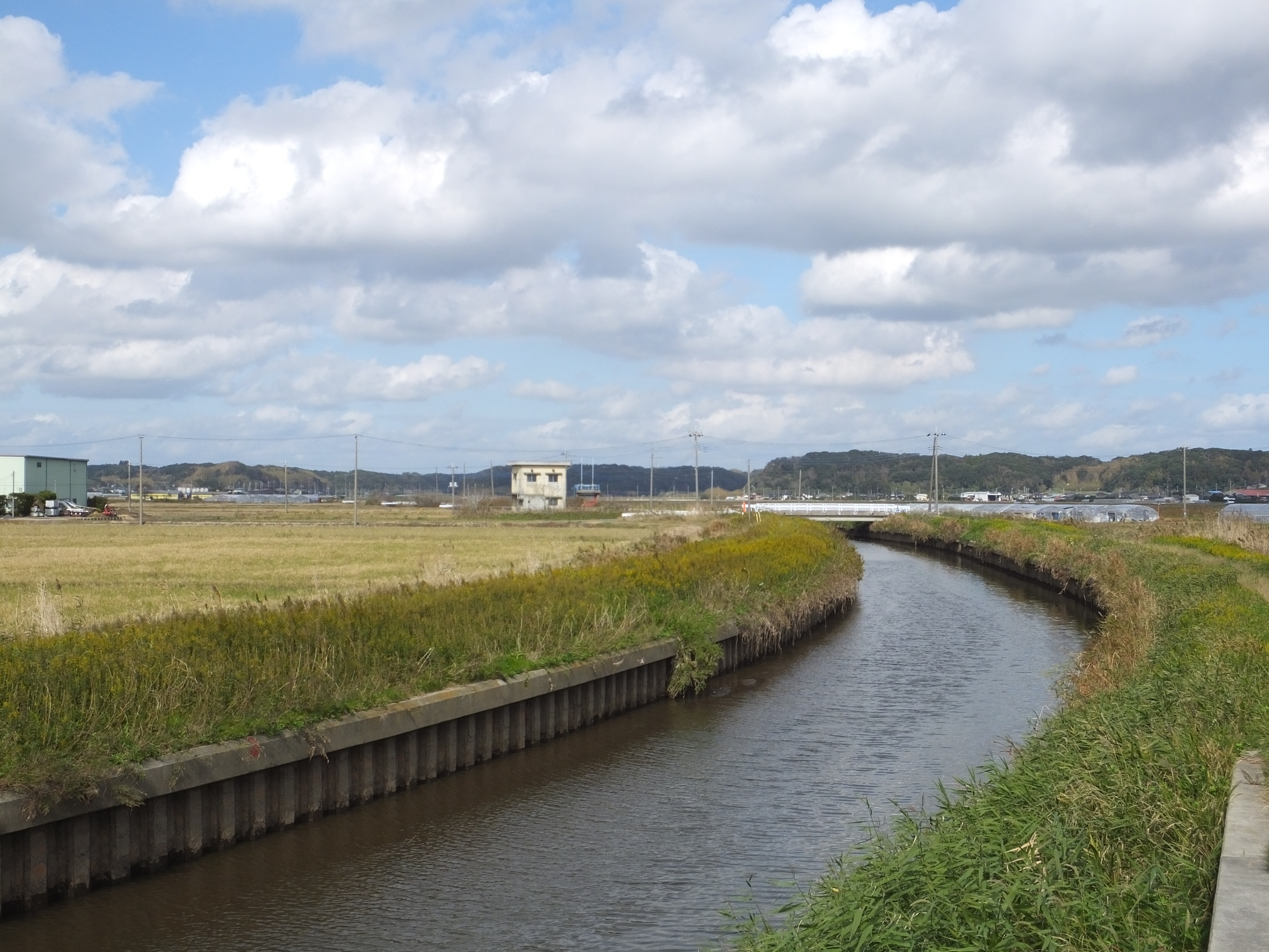 新川（千葉県旭市、万歳橋より上流方を見る、写っている橋は源助橋）